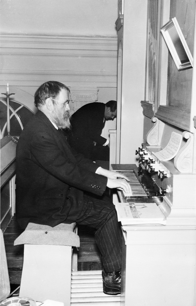 Einar Erici at the inauguration of the organ from 1724 in Svartnäs Church from 1793, in Dalecarlia. Einar Erici vid invigningen av orgeln från 1724 i Svartnäs kyrka från 1793. Parish (socken): Svartnäs Province (landskap): Dalarna Municipality (kommun): Falun County (län): Dalarna Photograph by: Moberg Date: 15.12.1956 Format: Print Kulturmiljöbild: 16001000280744 (Persistent URL) Read more about the photo database (in english)